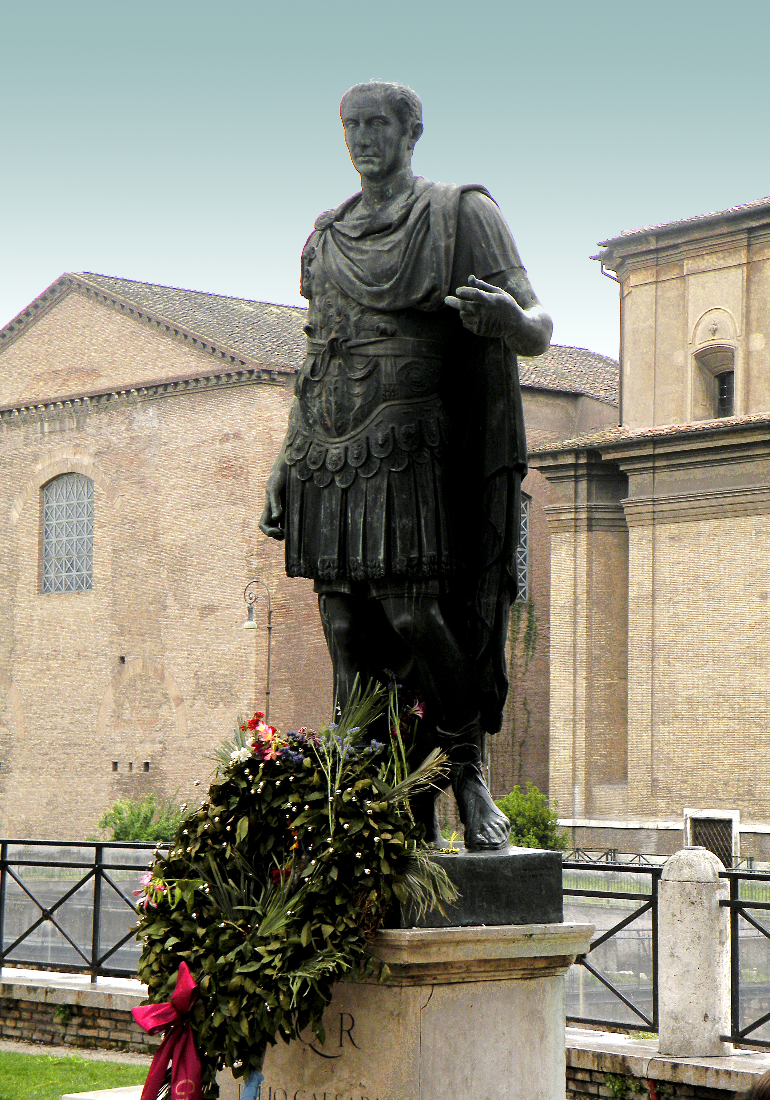 Caesar, Gaius Julius.